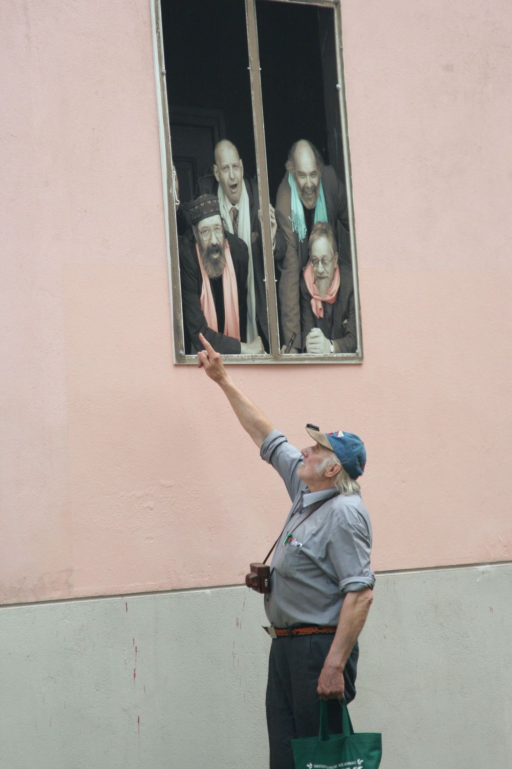 Tartu linna päev 2013.